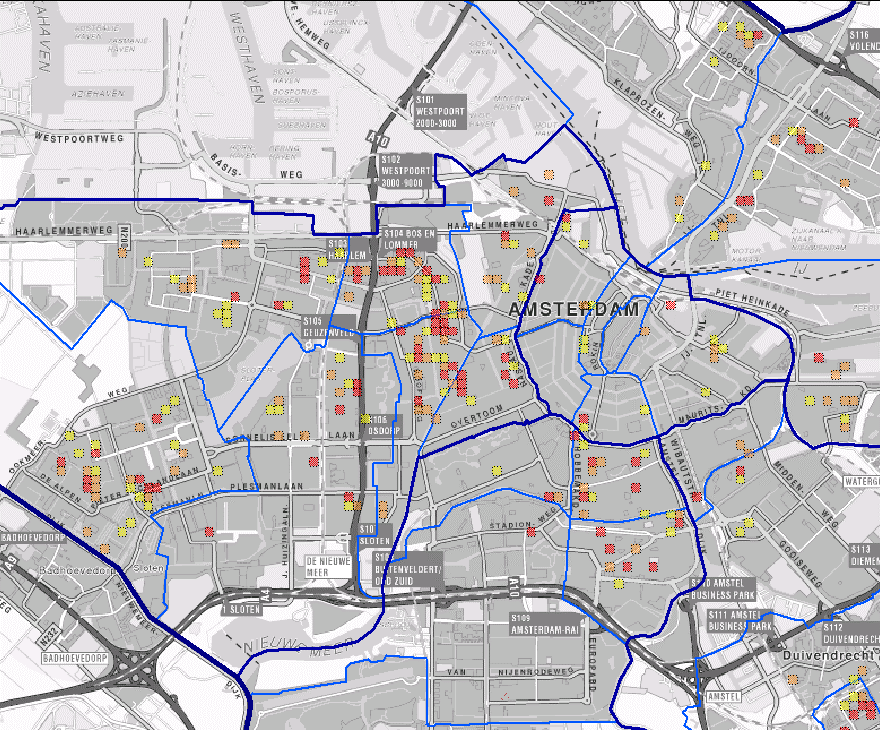 Regio Amsterdam in Criminaliteits Anticipatie Systeem